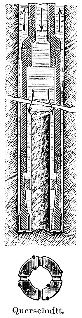 Diamantbohrkrone mit Kernrohr von Georges Auguste Leschot (1857)